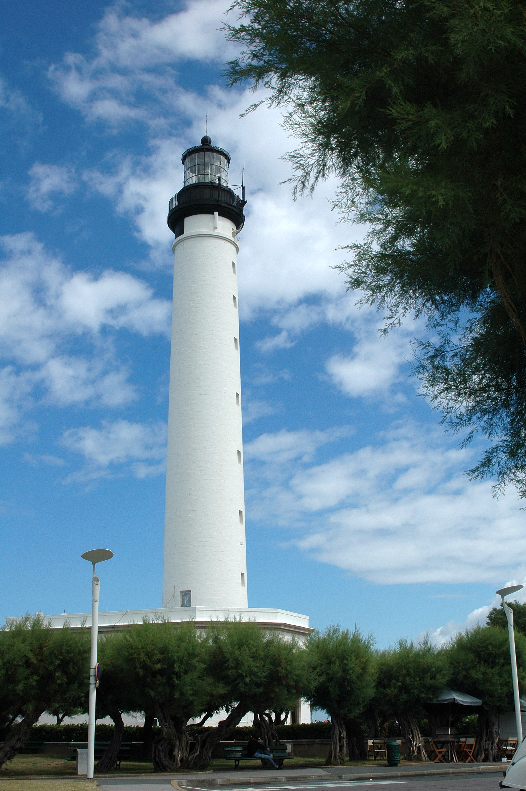 Biarritz, le phare. Photo prise le 14/08/06 par Harrieta171